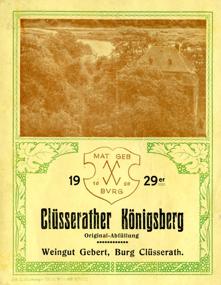 étiquette de bouteille de vin du producteur Gebert du burg de Clüsserath 1929